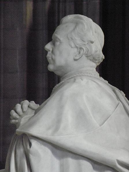 Statue du cardinal Touchet en la cathédrale Sainte-Croix d'Orléans (45)